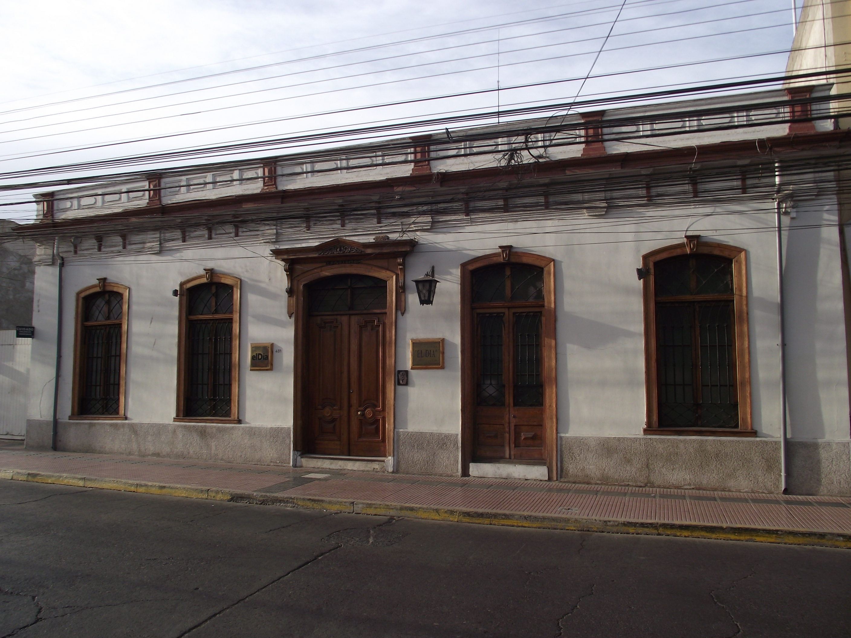 Edificio que alberga las oficinas y redacción del diario chileno El Día, ubicado en La Serena.